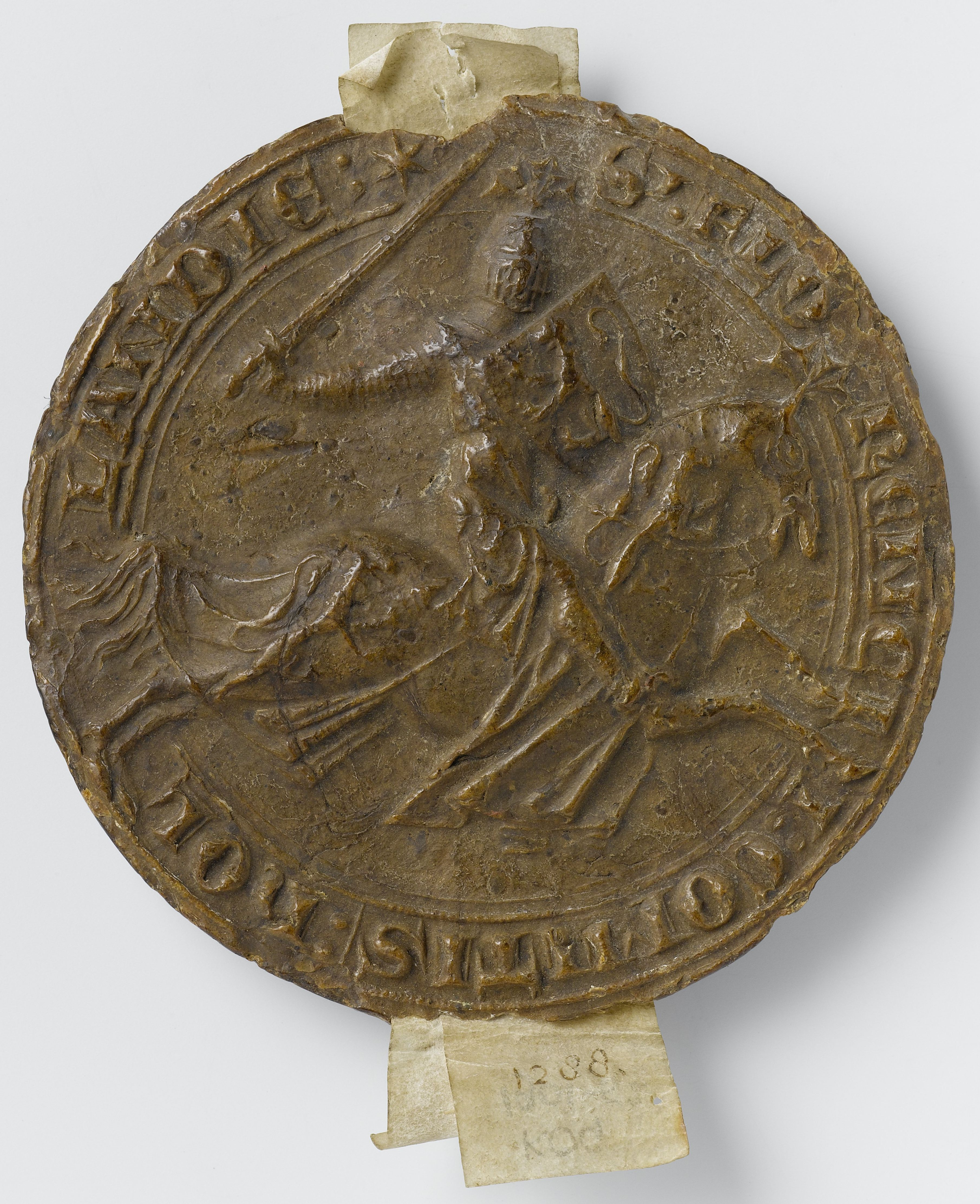 IdentificatieTitel(s): Lakzegel van Floris, graaf van HollandZegel van graaf Floris V van HollandObjecttype: zegel Objectnummer: NG-KOG-1901-52Opschriften / Merken: opschrift, voorzijde: ‘S. FLORENCII.COMITIS.HOLLANDIE’opschrift, keerzijde: ‘SECRETU.FLORECII. COMITIS. HOLLANDIE’Omschrijving: Zegel met tegenzegel in bruine was van graaf Floris V van Holland. Voorzijde: een naar rechts galopperend paard met een man in volle wapenrusting. De man heeft een zWaar: d in de opgeheven rechterhand en in de linkerhand een 'petit écu' met heraldisch embleem. Keerzijde: wapenschild.VervaardigingVervaardiger: anoniemPlaats vervaardiging: NederlandDatering: ca. 1266 - ca. 1296Materiaal: was Techniek: drukkenAfmetingen: h 10,9 cm. × b 8,8 cm. × d 1,8 cm. OnderwerpWat: riding a horse, ass, or mule; rider, horsemanarmourWanneer: 1266 - 1296WaarHollandWie: Floris V (graaf van Holland en Zeeland)Verwerving en rechtenCredit line: Bruikleen van het Koninklijk Oudheidkundig GenootschapVerwerving: bruikleen 1930Copyright: Publiek domein